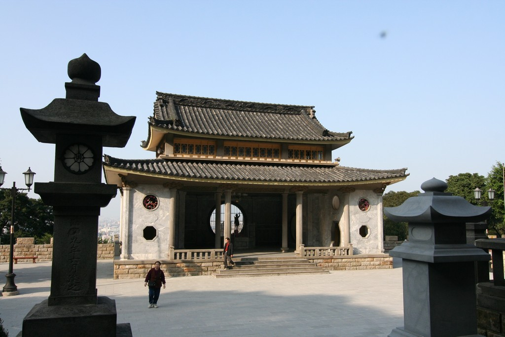 臺北縣中和市圓通寺。